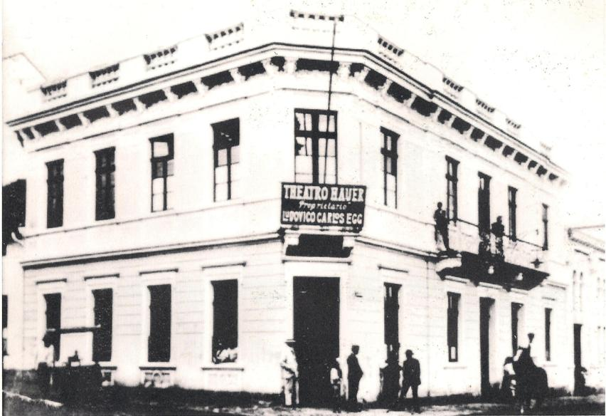 Antigo Theatro Hauer em 1913